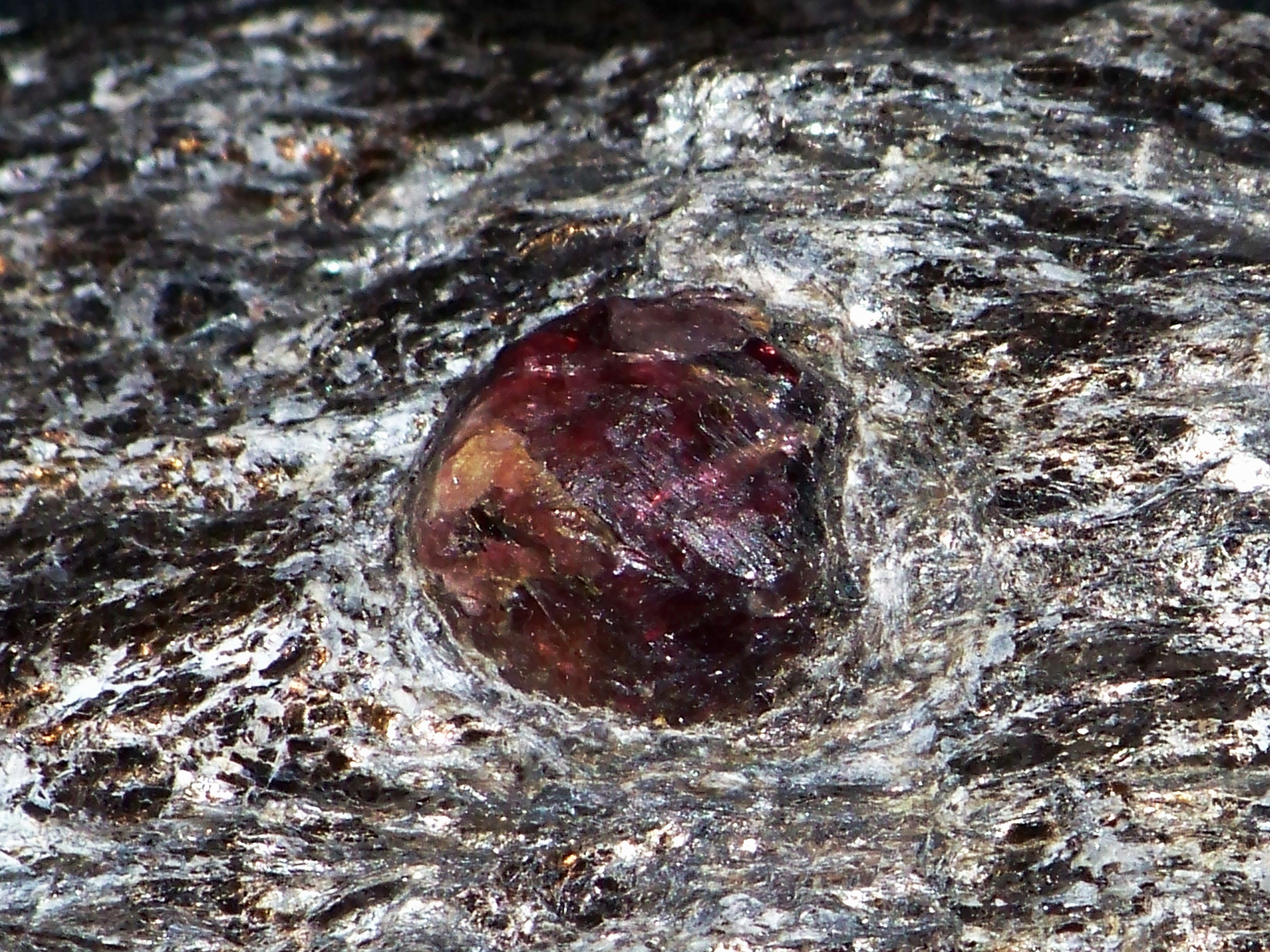 Almandyn w łupku muskowitowym, Półwysep Kola, Rosja